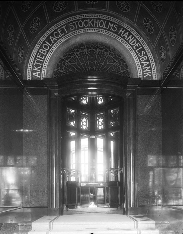 Interiör från Handelsbanken vid Kungsträdgårdsgatan 2 B